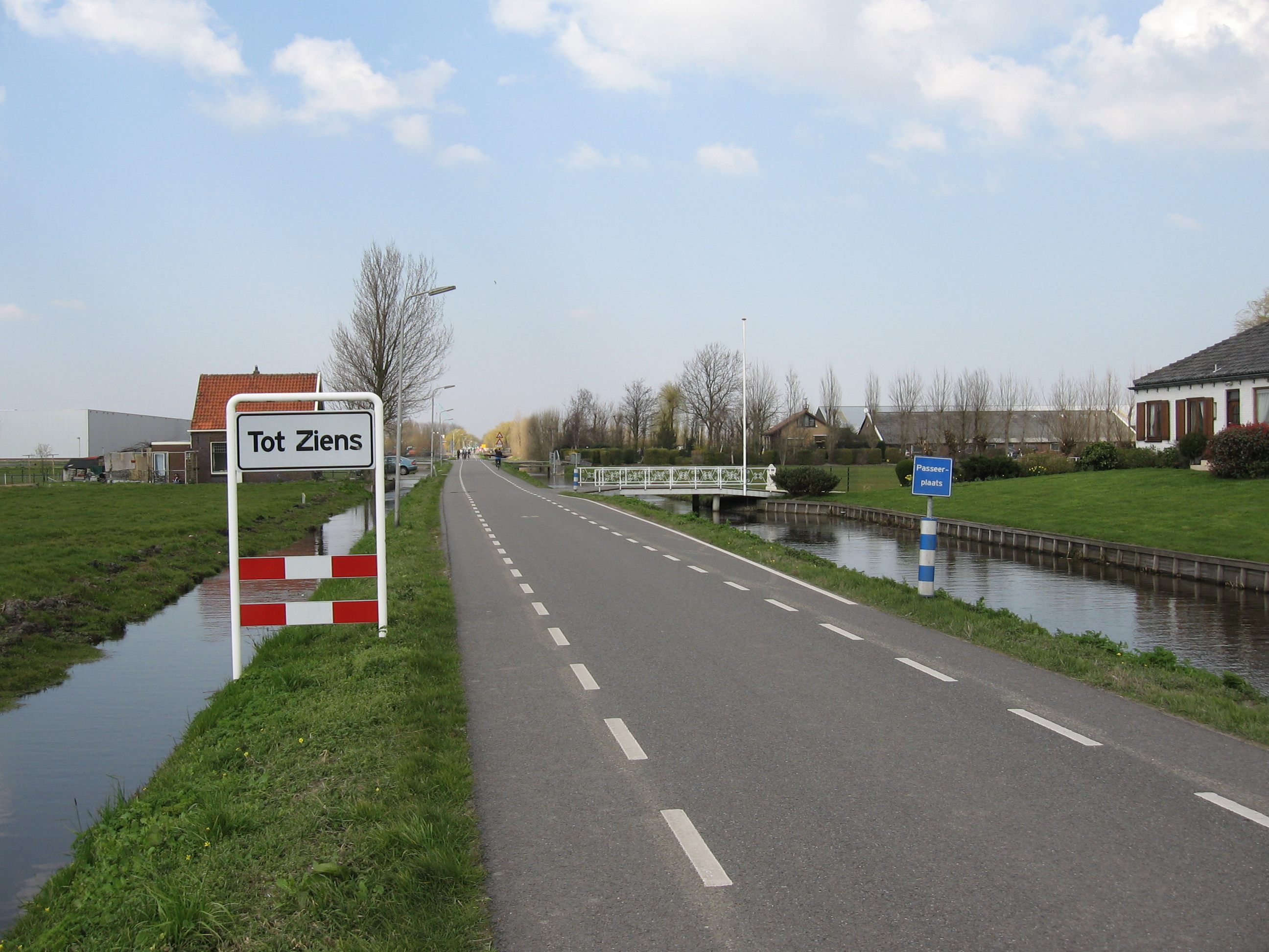 "Tot_Ziens", a common expression in